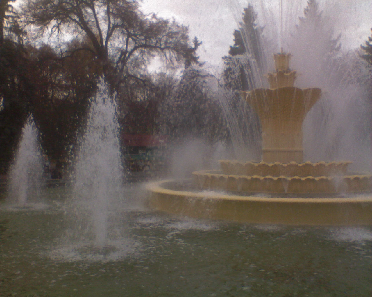 Фонтан у Центральному парку, Вінниця 2013